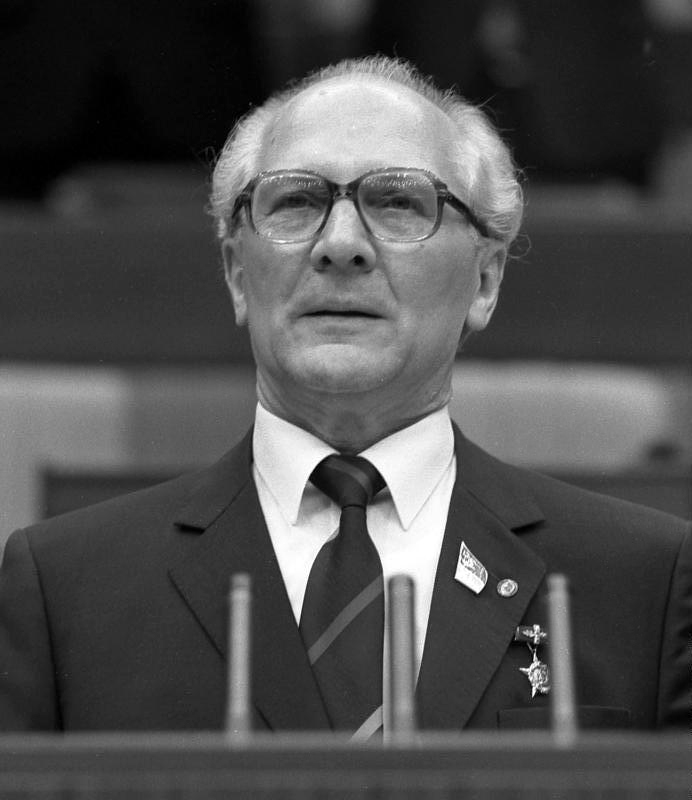 ADN-ZB Mittelstädt 21.4.1986 Berlin: XI. SED-Parteitag Der wiedergewählte Generalskretär des ZK der SED, Erich Honecker, bei seiner Schlußansprache auf dem XI. Parteitag der SED.